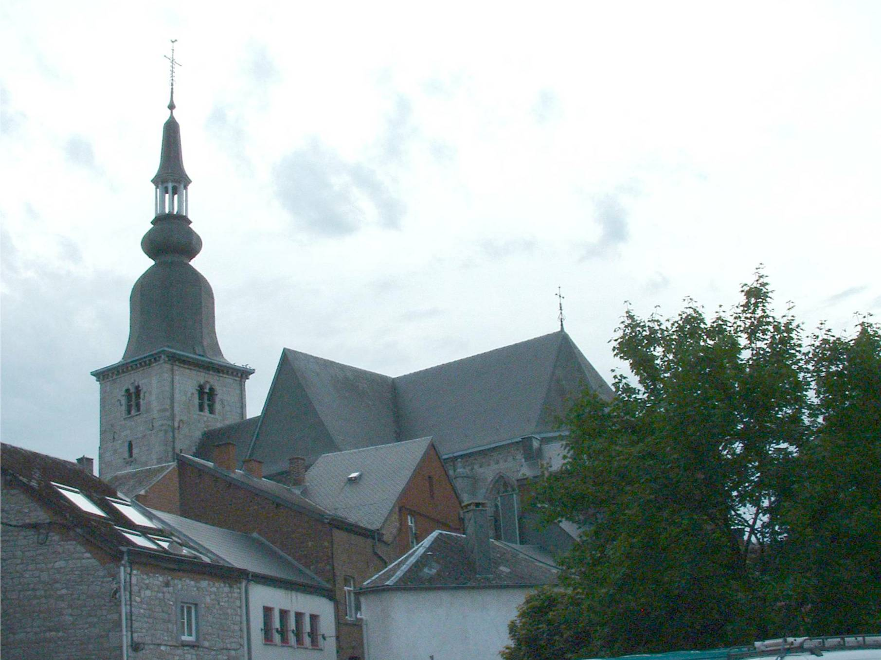 Foto: G. Debognies (28/07/05)